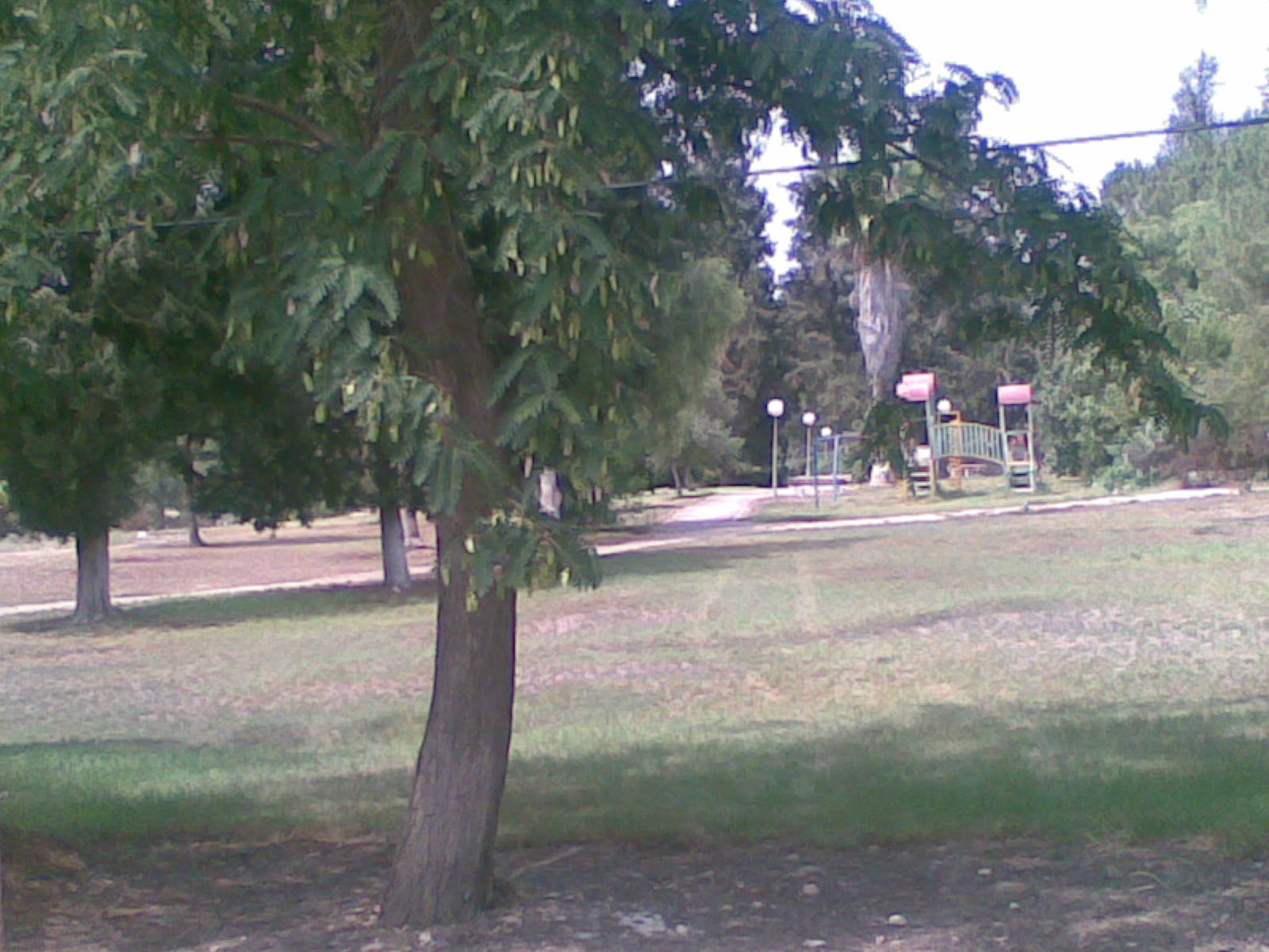 מרכז המושב; הדשא המרכזי וגן השעשועים